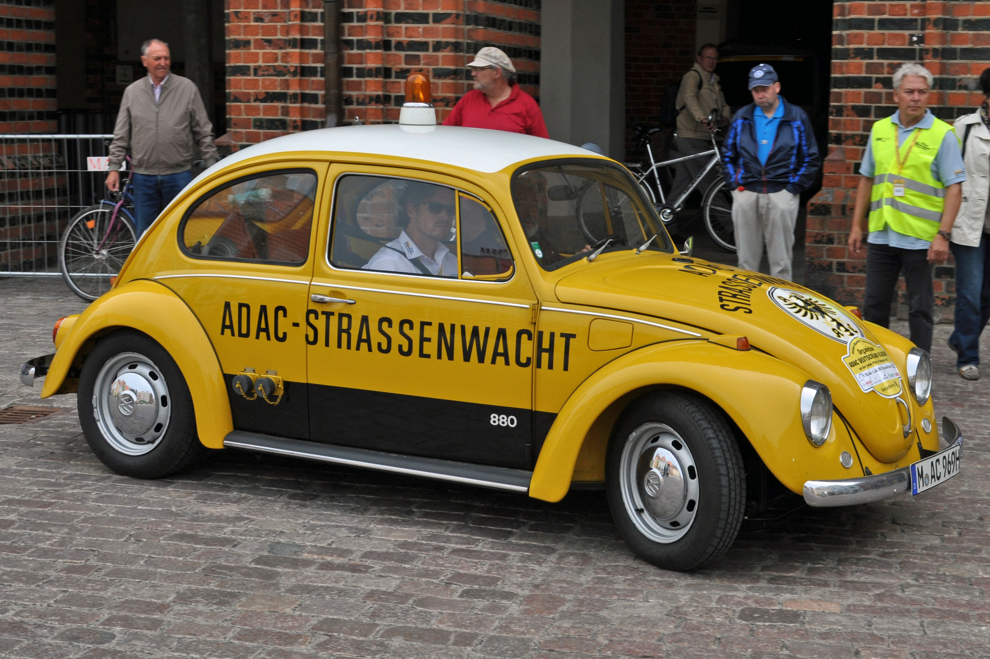 Im Tierpark Stralsund (see Tierpark Stralsund. gesehen bei der ADAC Deutschland Classic Stralsund-Ostsee